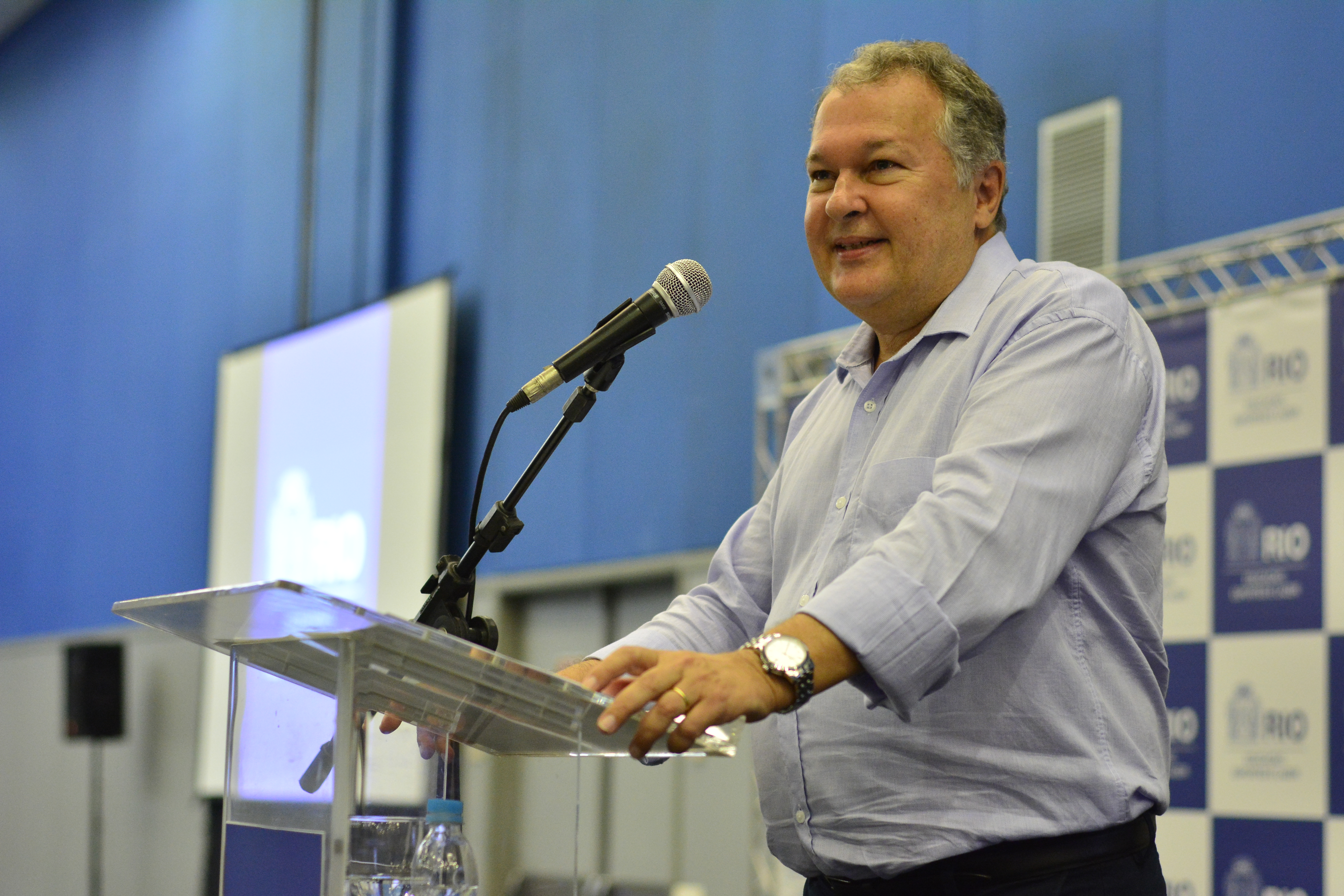 César Benjamin como Secretário Municipal de Educação do Governo Crivella, na prefeitura do Rio de Janeiro